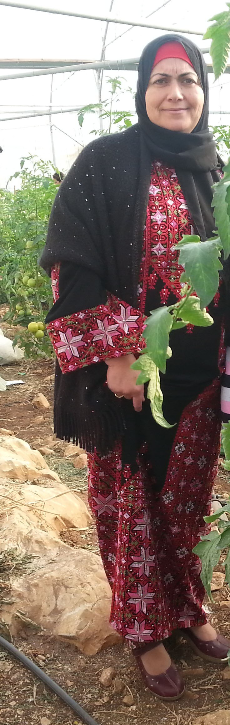 ثوب فلسطيني